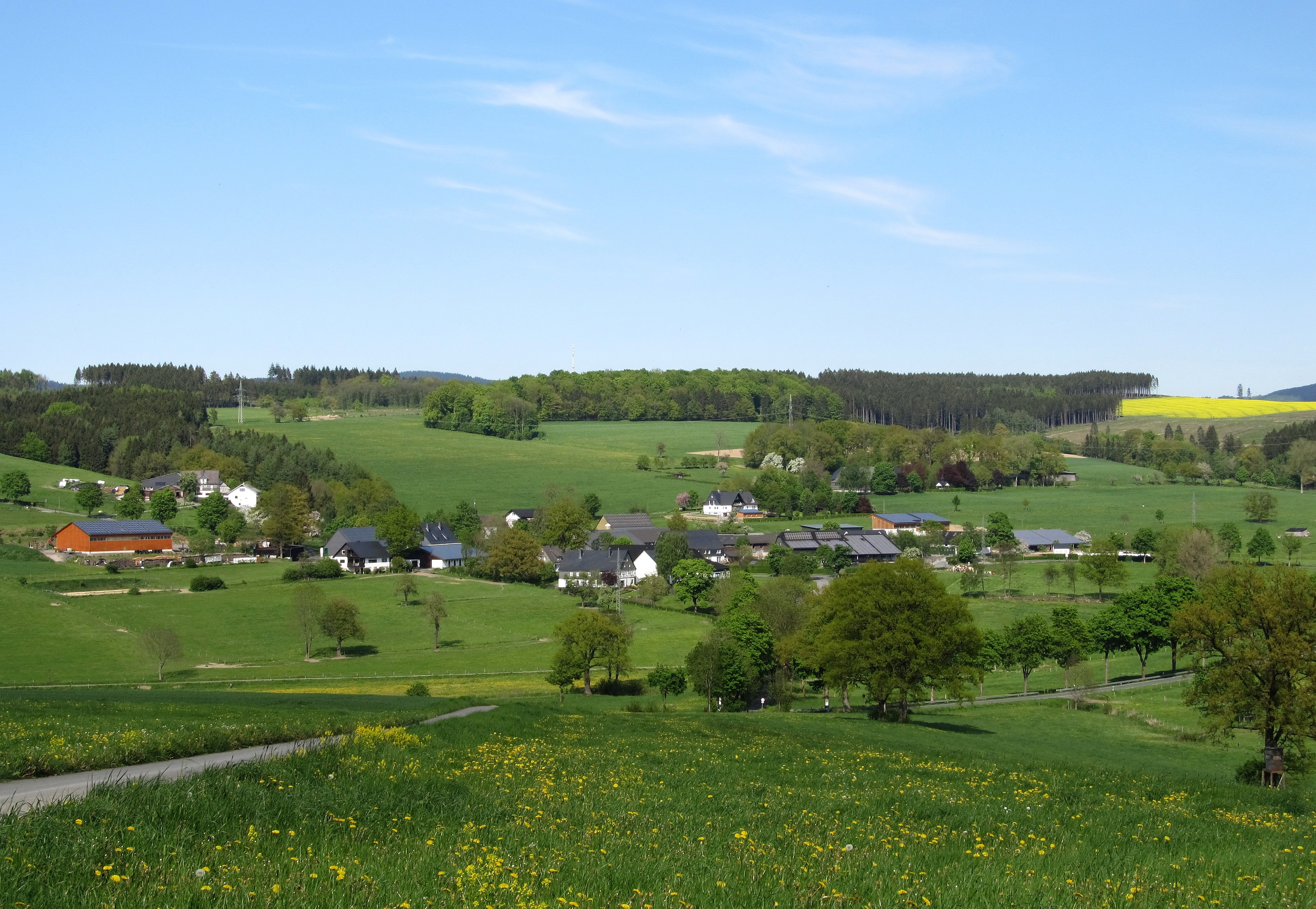 Blick auf Obringhausen, Stadt Schmallenberg (Germany)